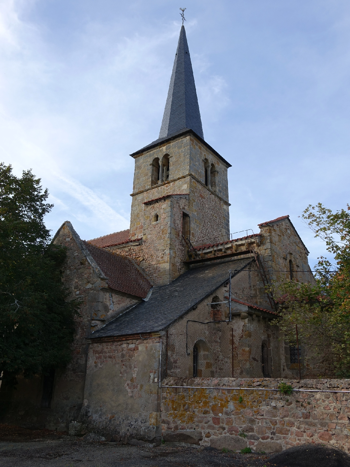 Église Saint-Martin